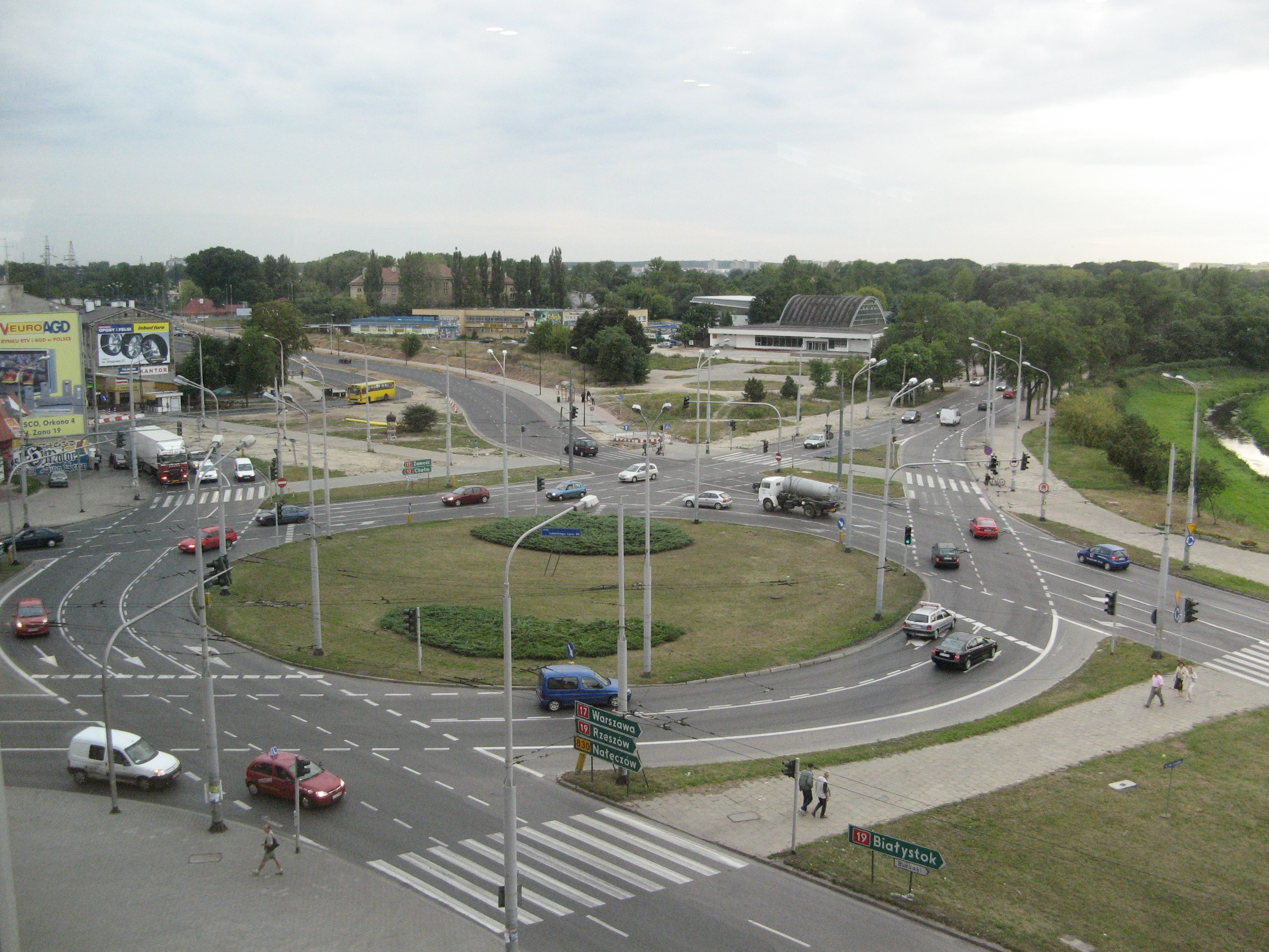 Lublin - Al. Unii Lubelskiej, Al. Zygmuntowskie